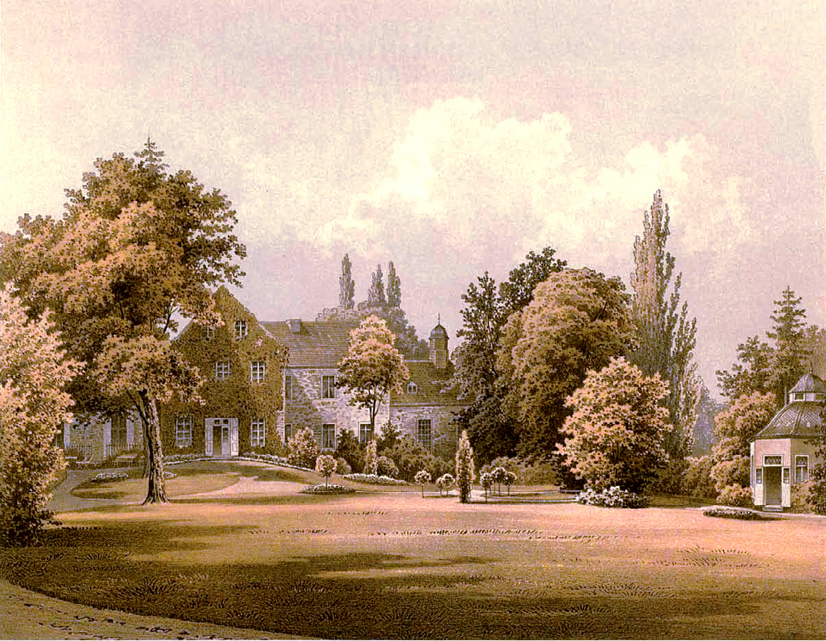 Schloss und Rittergut Bodendorf, Lithographie des Wohnsitzes mit Erläuterungen auf der darauffolgenden Seite. In: Die ländlichen Wohnsitze, Schlösser und Residenzen der ritterschaftlichen Grundbesitzer in der preussischen Monarchie : nebst den königlichen Familien-, Haus-Fideicommiss-Schatull-Gütern in naturgetreuen, künstlerisch ausgeführten, farbigen Darstellungen ; nebst begleitendem Text. Duncker, Alexander (Hrsg.), Berlin : Duncker, (1857/83).